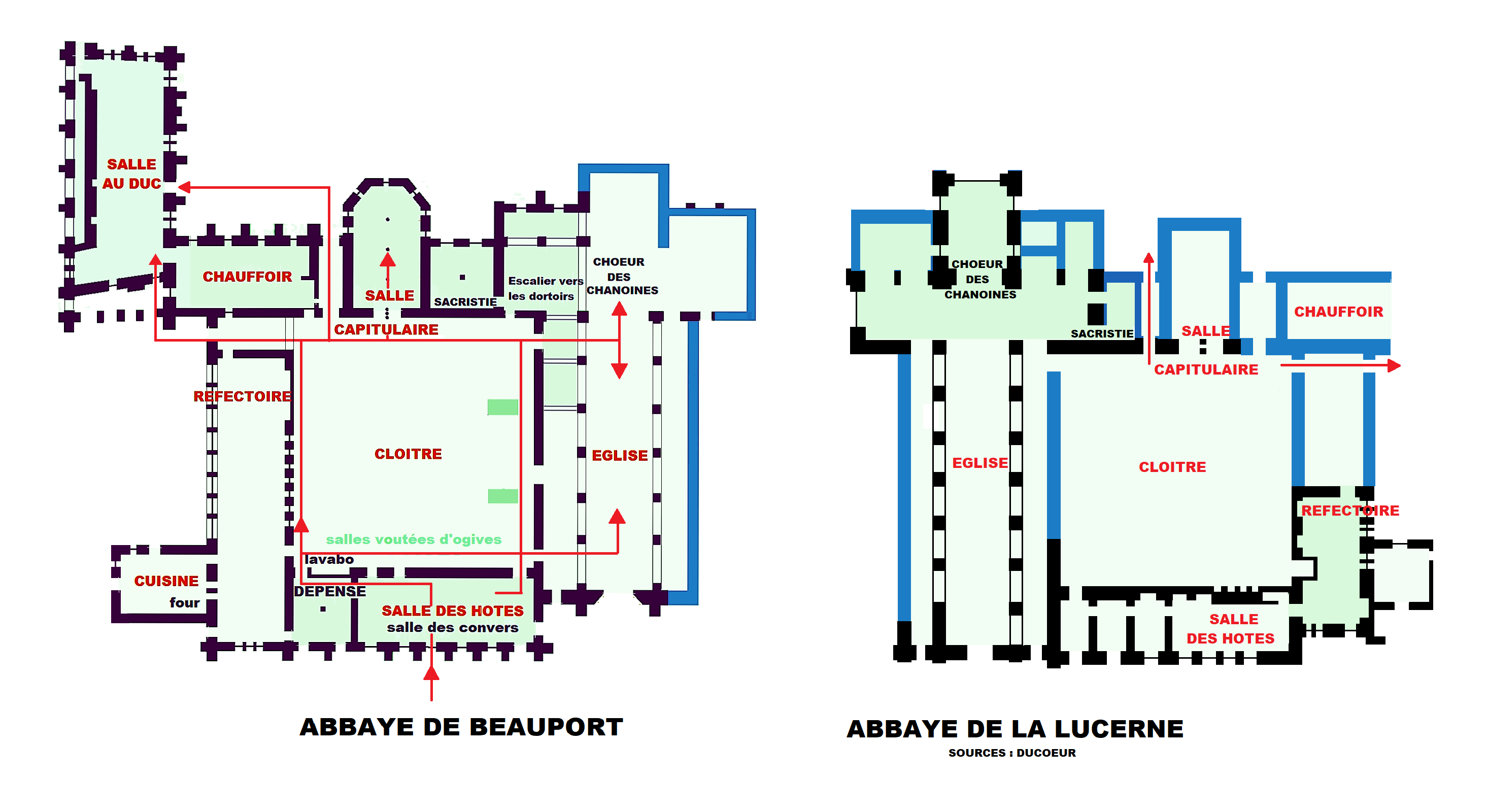 Comparaison des plans des abbayes de Beauport (22) et de La Luverne (50)